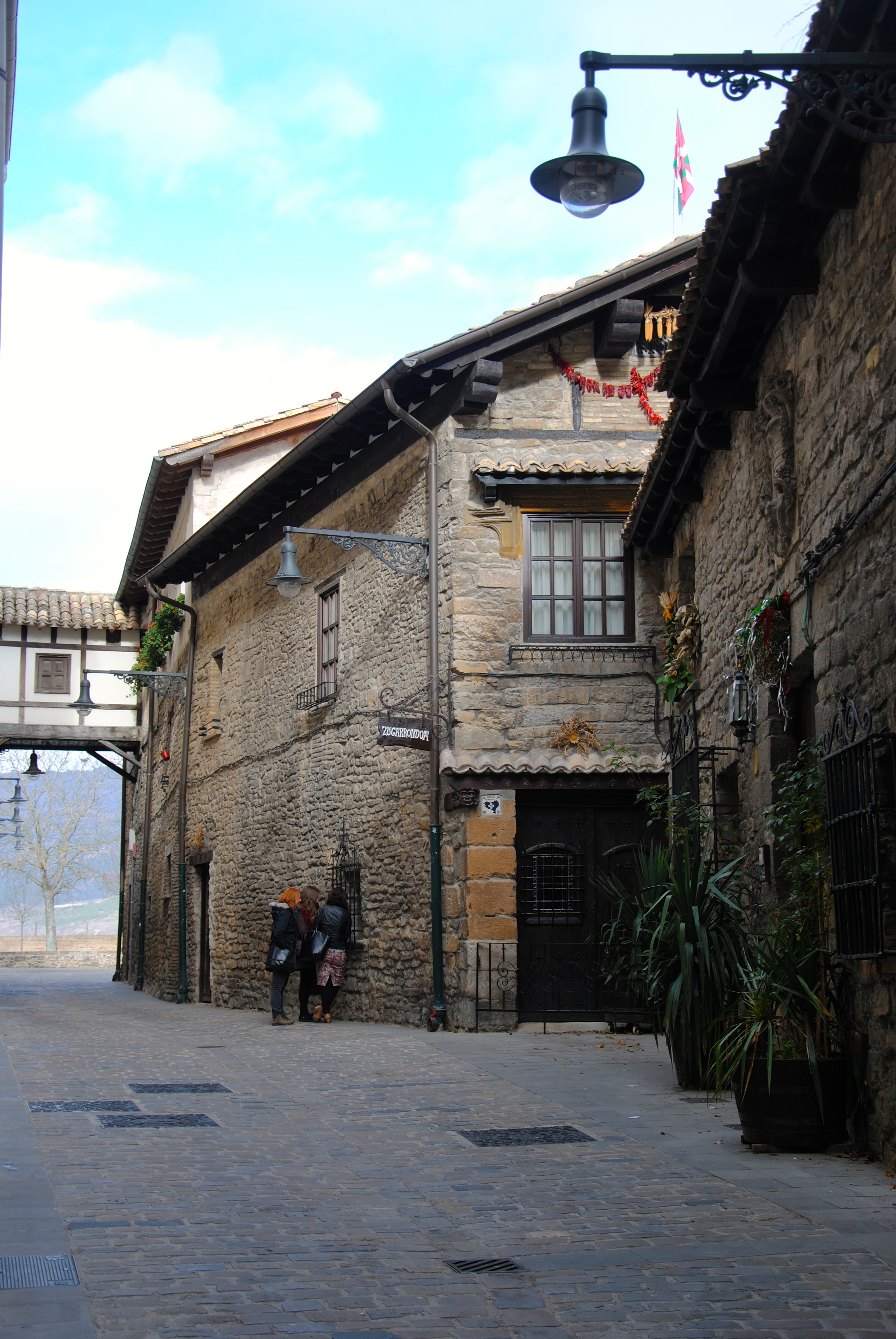 Pamplona